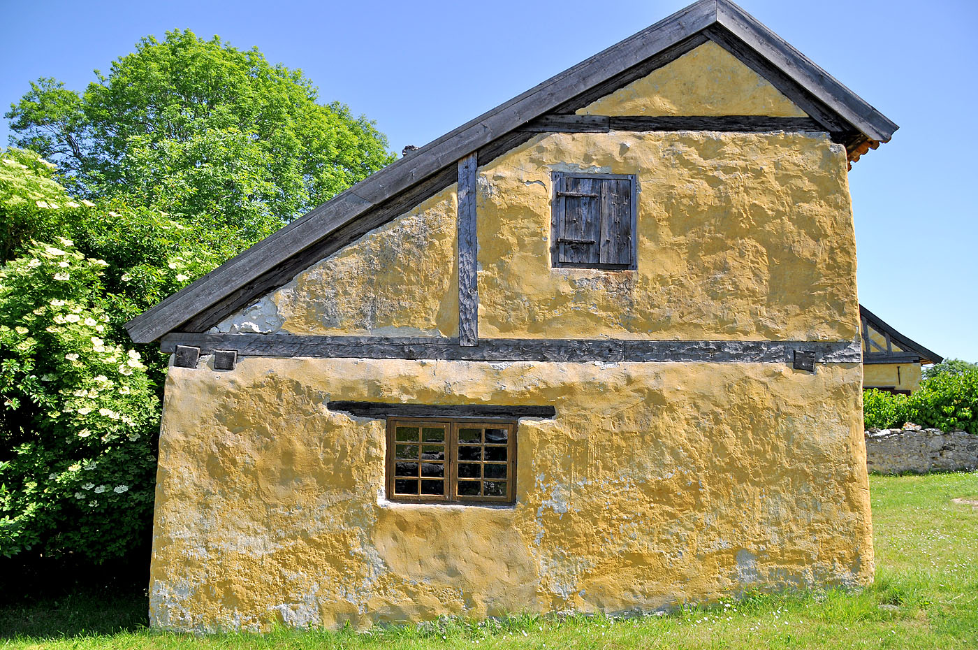 Strandridargården från 1730.